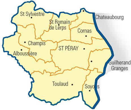 Carte détaillée des communes du canton (Ardèche)